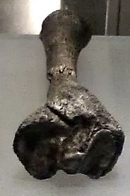 KNM-KP 29285A & KNM-KP 29285B: Right Proximal Tibia - KNM-KP-29285A Right Distal Tibia - KNM-KP-29285B of Australopithecus anamensis. Cast at the Museo Nacional de Ciencias Naturales in Madrid (Spain)